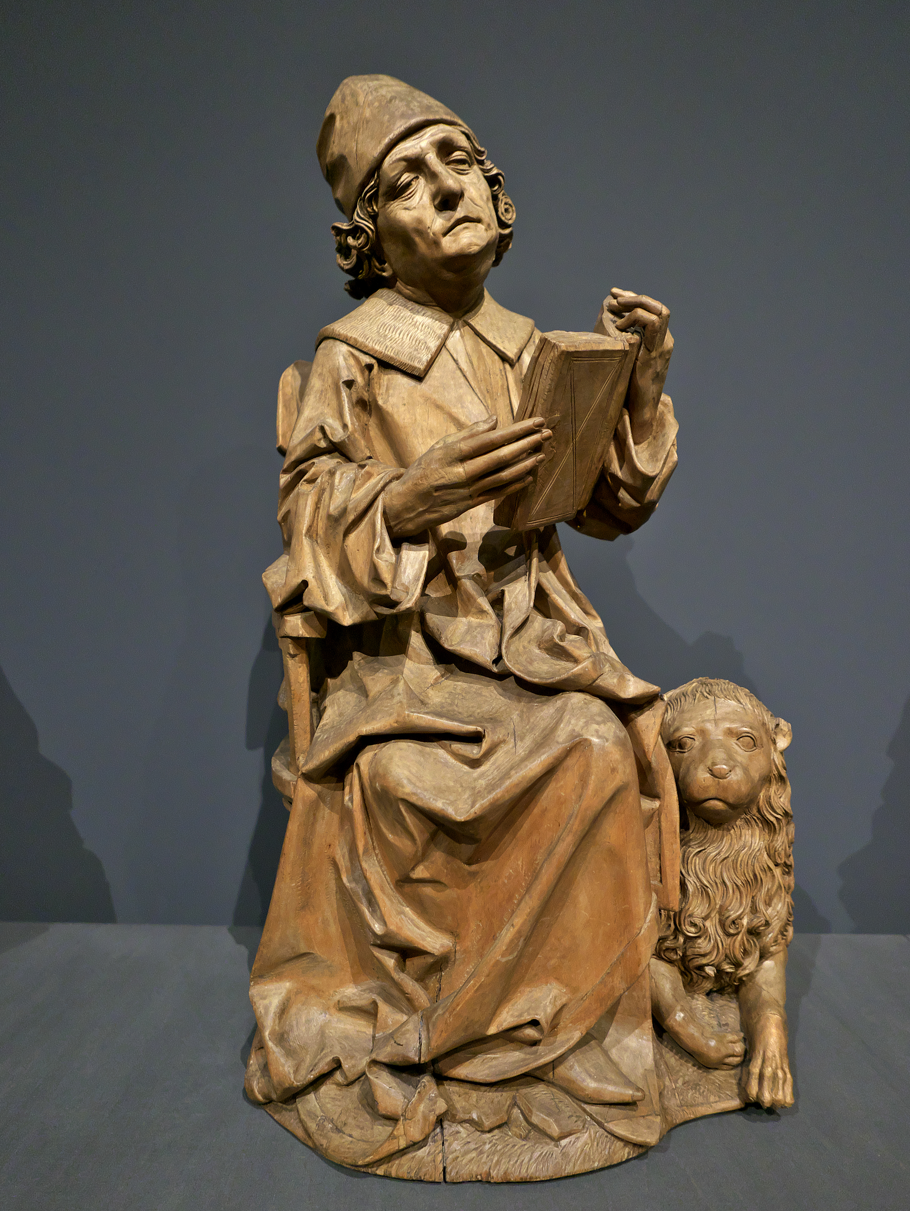 Últimos fuegos góticos, Palacio de Villena (Valladolid). Procedente del Bode Museum, predela del retablo mayor de la Iglesia Santa María Magdalena (Münnerstadt). (Tilman Riemenschneider), h. 1490-1492, madera de tilo.